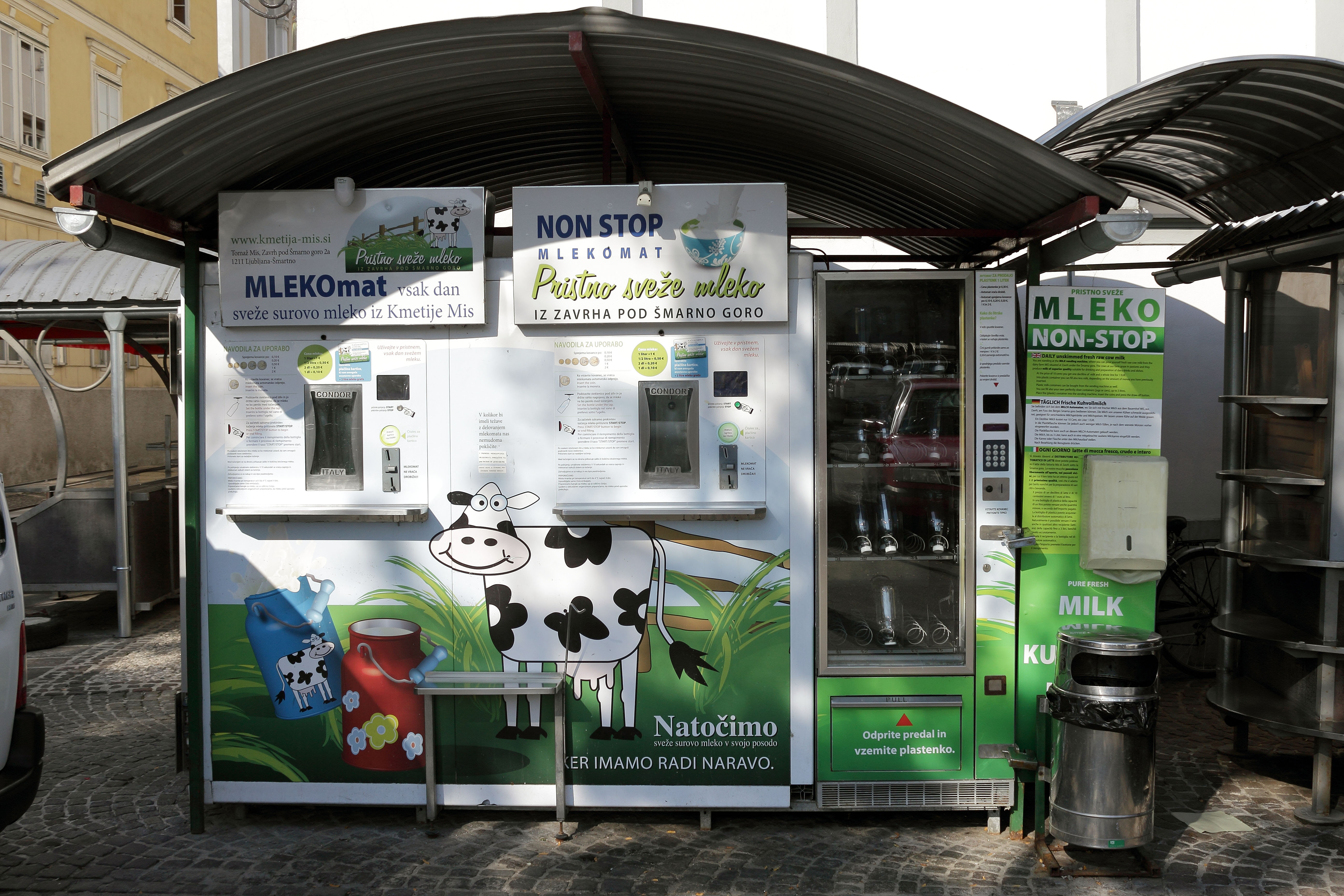 Lubiljana